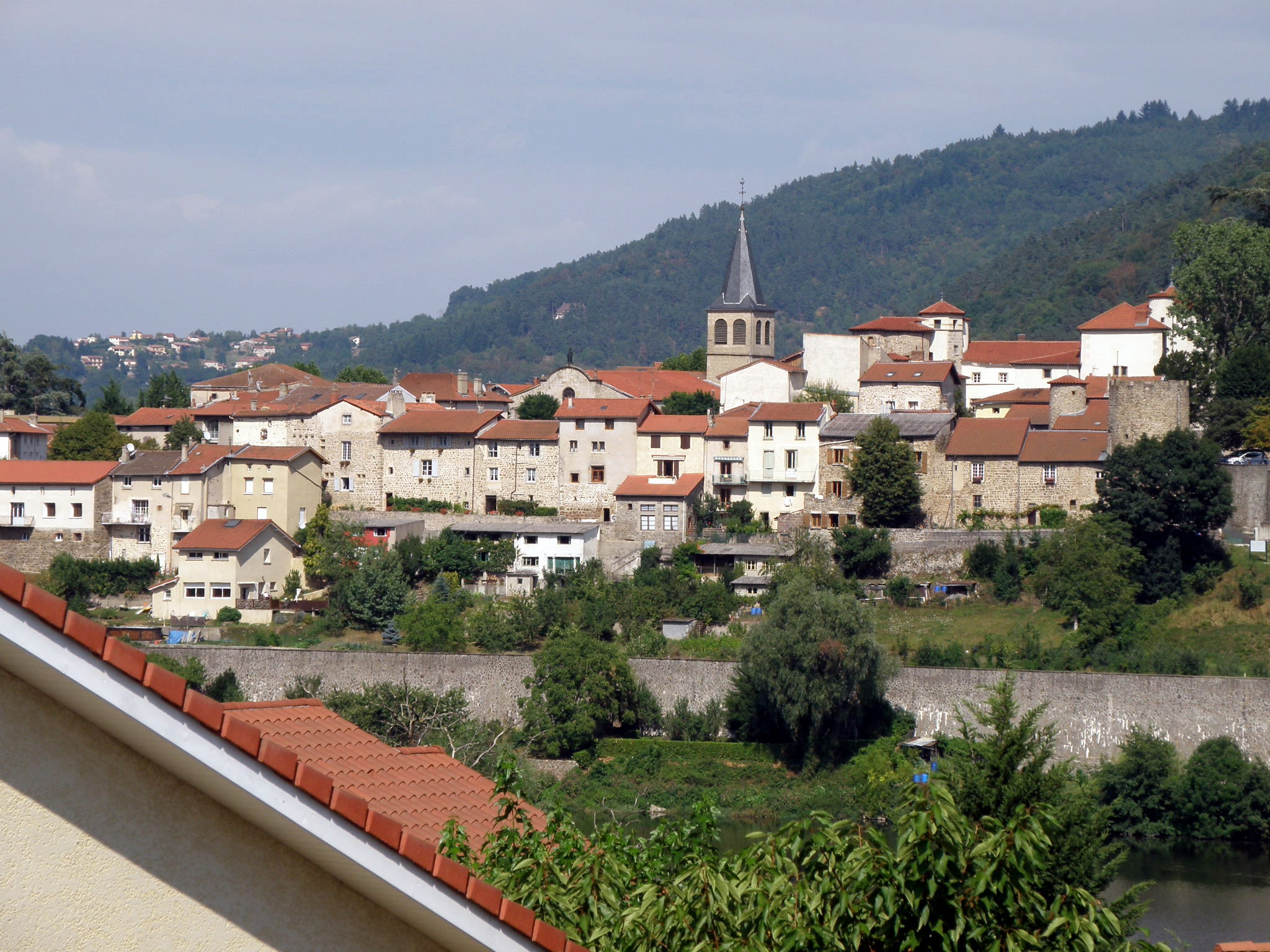 Aurec-sur-Loire, dép. de Haute-Loire, France (région Auvergne). Vue générale du bourg médiéval depuis la rive opposée de la Loire. Le fleuve est visible à l'avant-plan en bas à droite, ainsi que le remblai (mur gris) de la ligne de chemin de fer Saint-Etienne—Le Puy. Au centre, clocher de l'église Saint-Pierre; à droite de celui-ci, château seigneurial d'Aurec. Un peu en contrebas, près du bord droit de la photo: château du moine sacristain (tour crénelée).